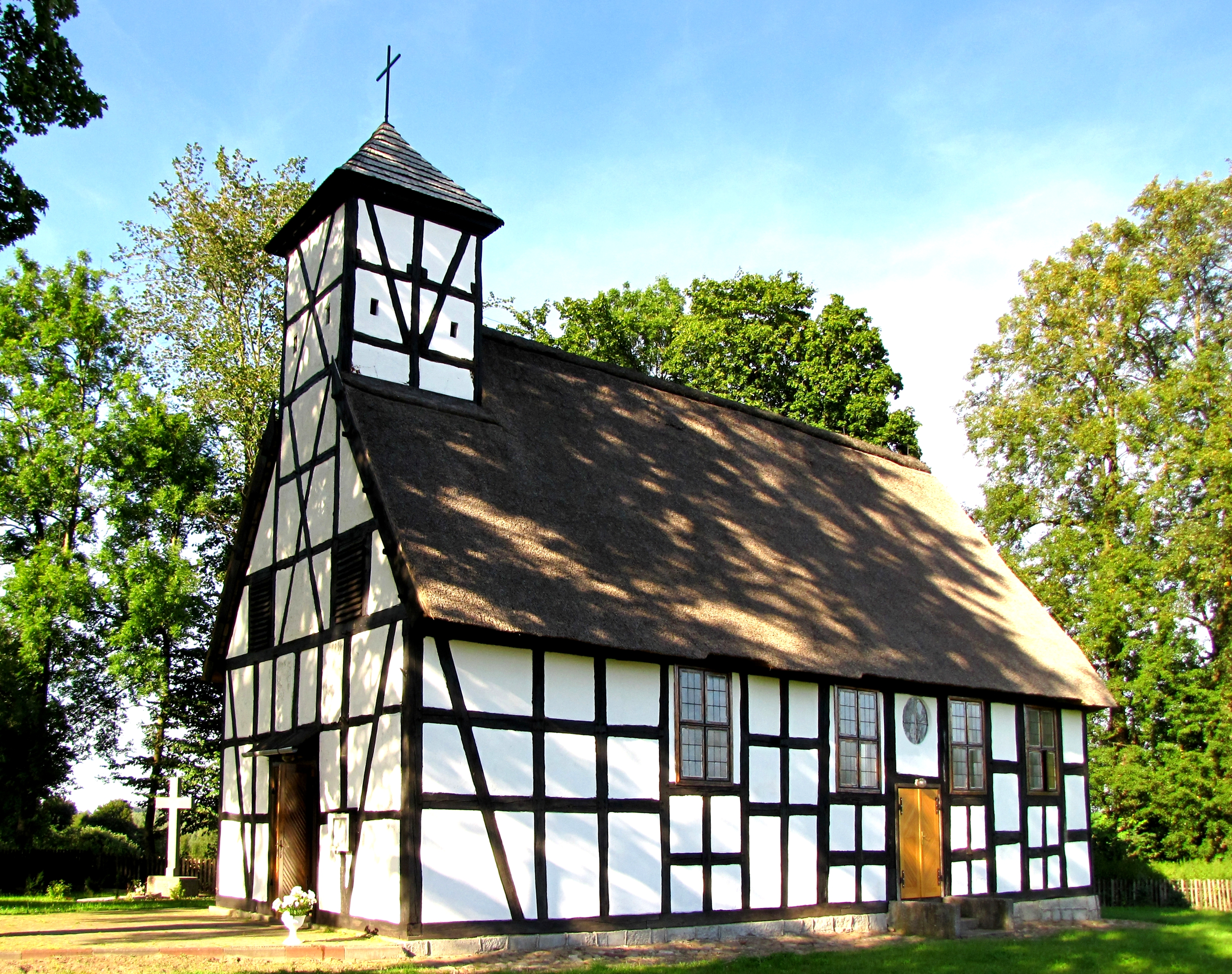 Garbno - szachulcowy kościół pw. św. Antoniego Padewskiego, 1769 (zabytek nr 24)